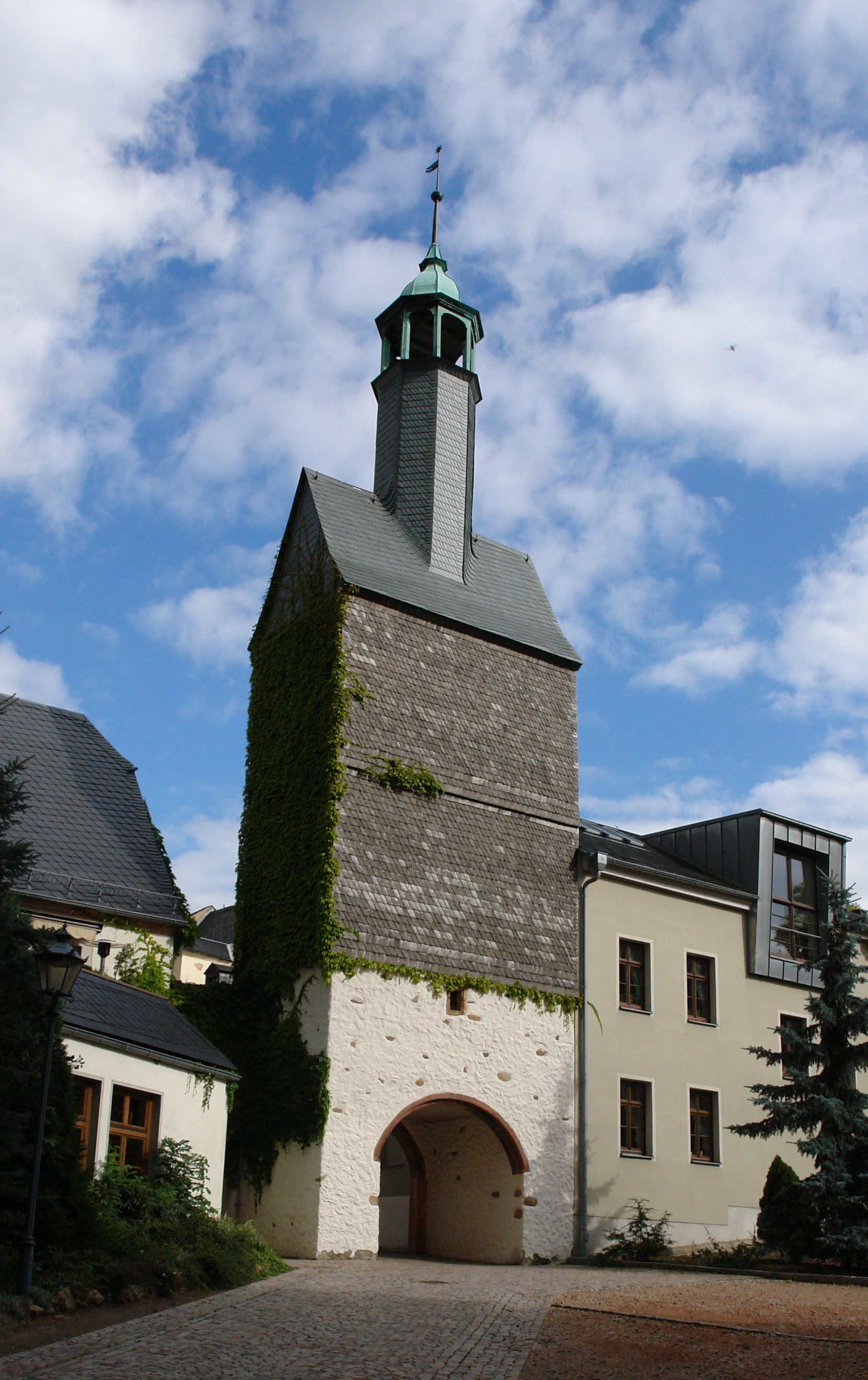 Durchgangstor zur Kirche Burgstädt